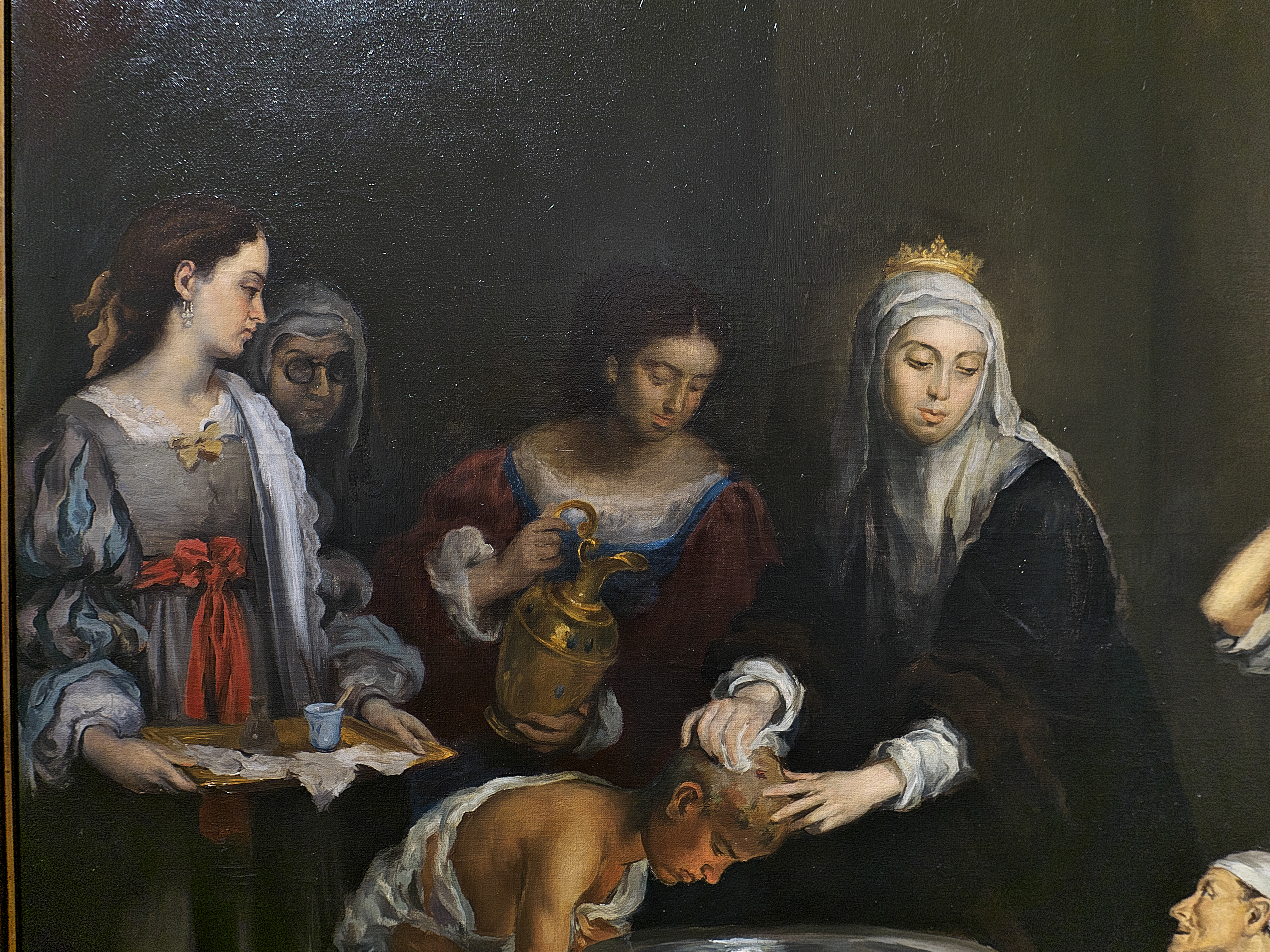 Es copia (ca. 1932) de la pintura de Bartolomé Esteban Murillo, Santa Isabel curando a los tiñosos (1672), cuando la santa funda su hospital en Eisenach, cerca del Castillo de Wartburg, para curar personalmente a los niños tiñosos y leprosos. Santa Isabel de Hungría curando a los tiñosos (Bartolomé Esteban Murillo)